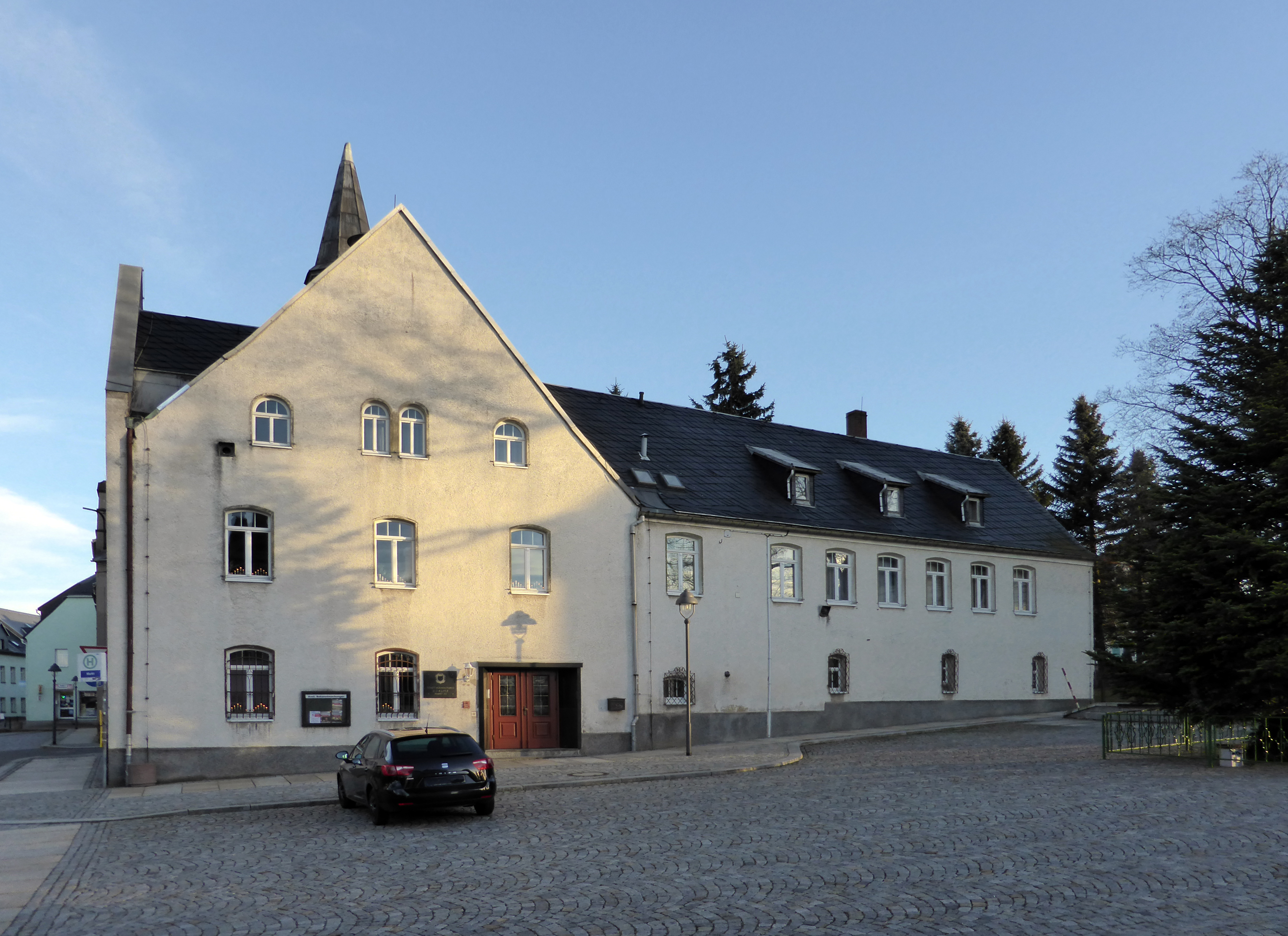 Stadtverwaltung Zöblitz (Markt 23), Erzgebirgskreis - Sachsen.